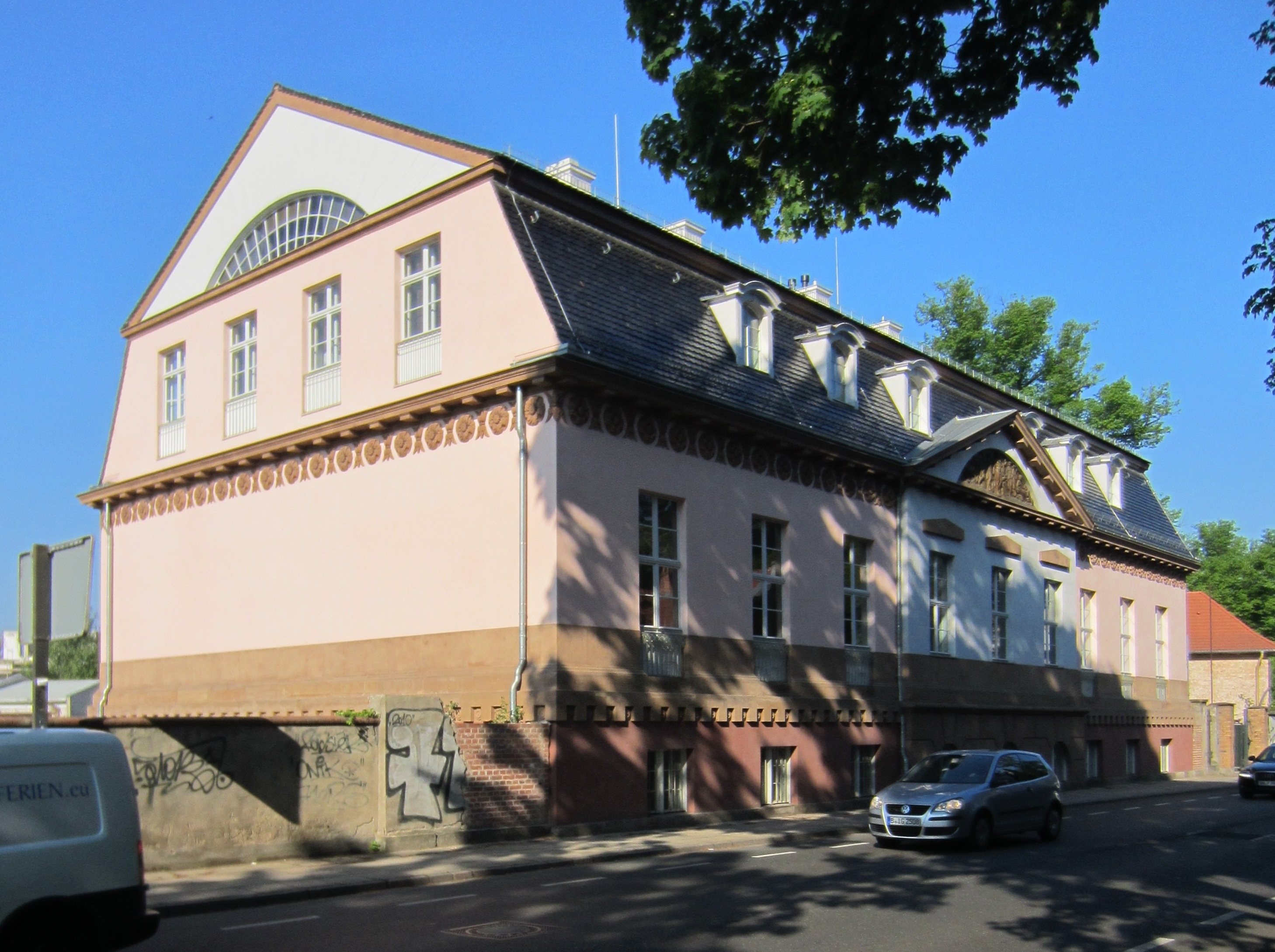 Palais Lichtenau in Potsdam, Behlertstraße 31, Straßenseite